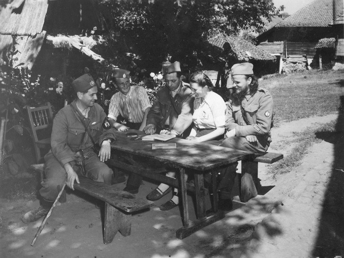 Српски (ћирилица): Санитетски одсек ВК ЈВуО, др Немања Вурдеља, непознати, др Милорад Јовановић, Анђа Лалатовић, супруга пуковника Мирка Лалатовића, функционер ЖРОС-а, поручник Момир Кузељевић.